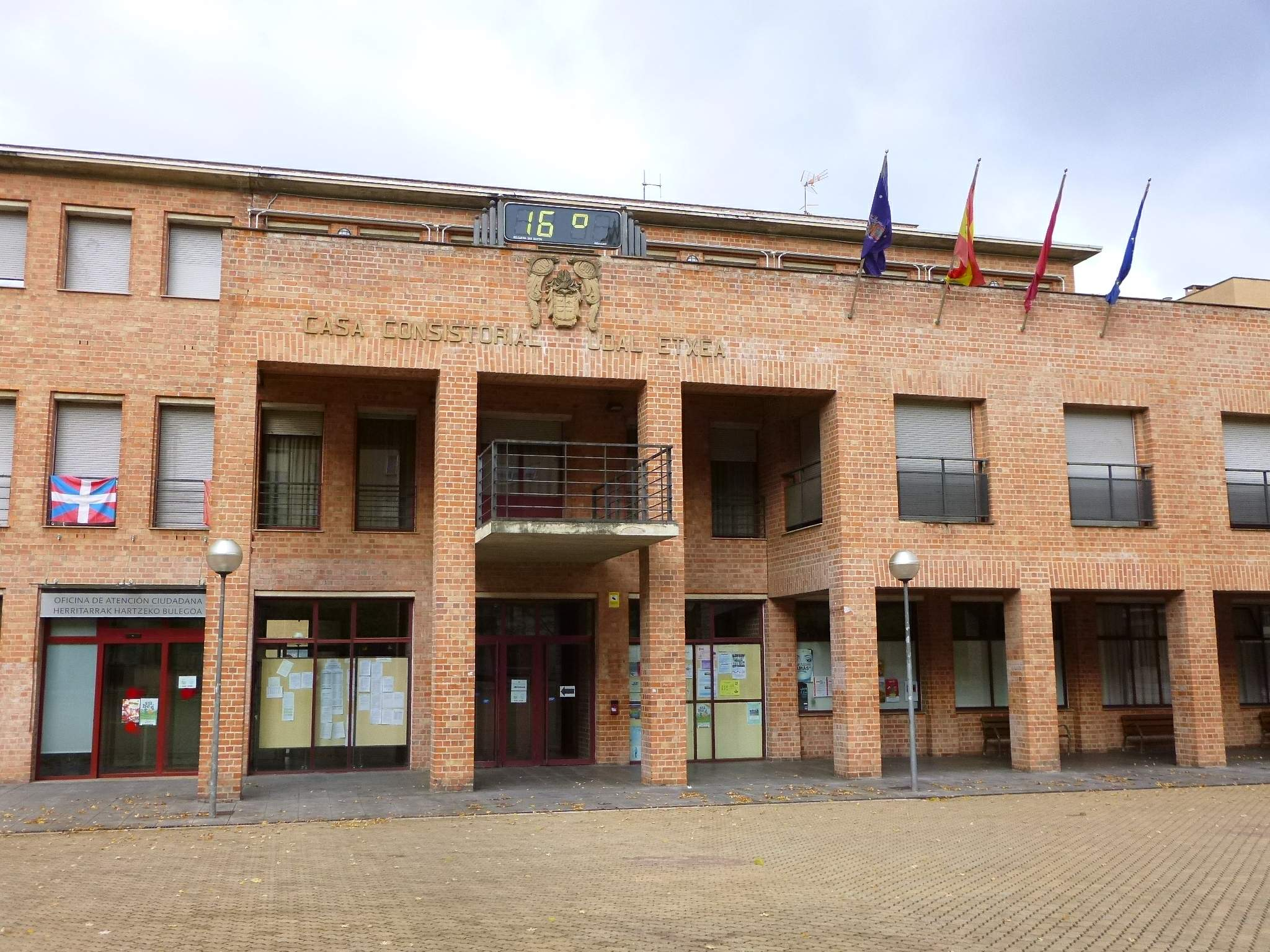 Ayuntamiento de Barañain (Navarra)